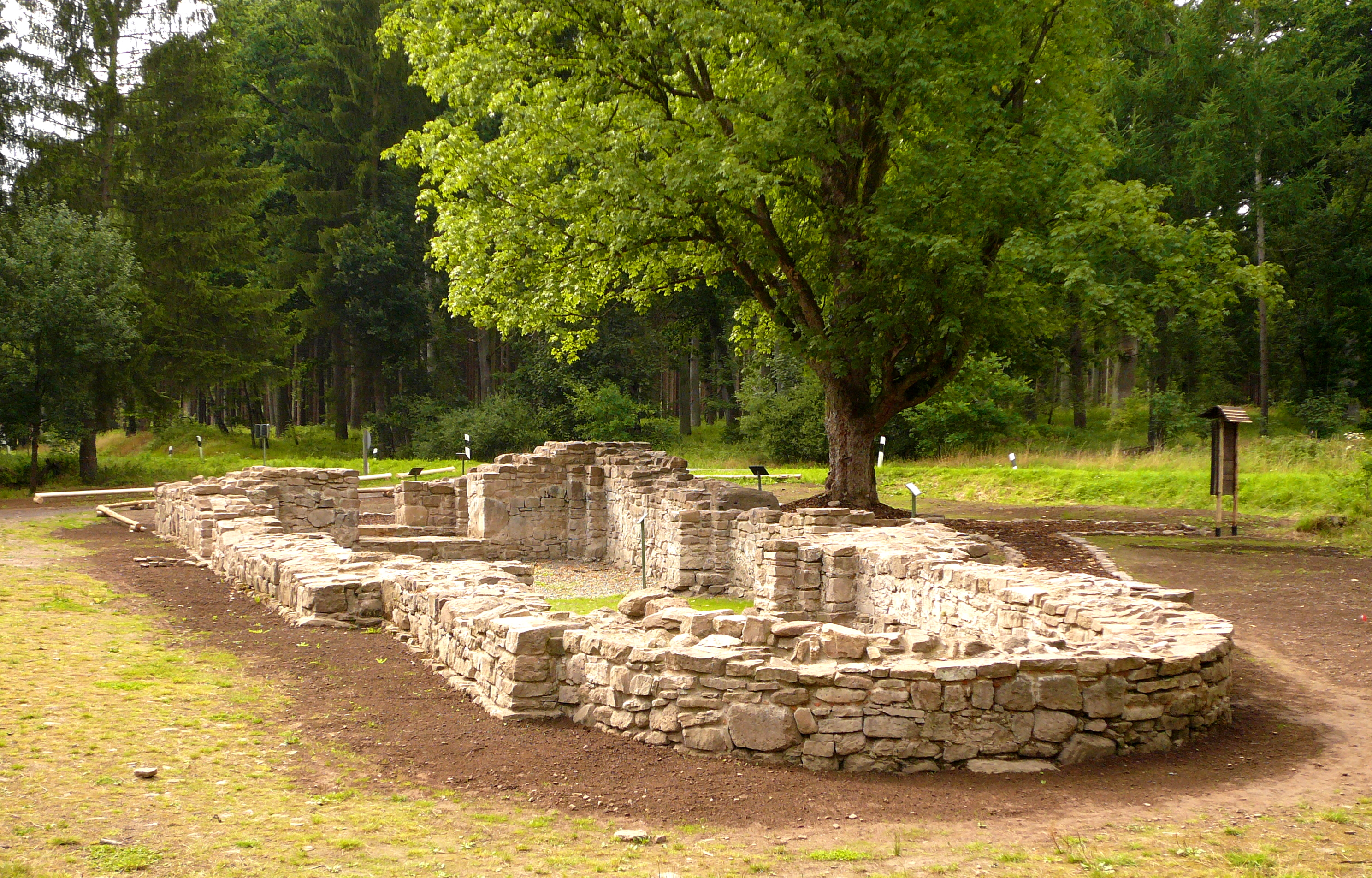 Kirchenruine der Wüstung Winnefeld im Solling, erbaut 2. Hälfte 12. Jahrhundert